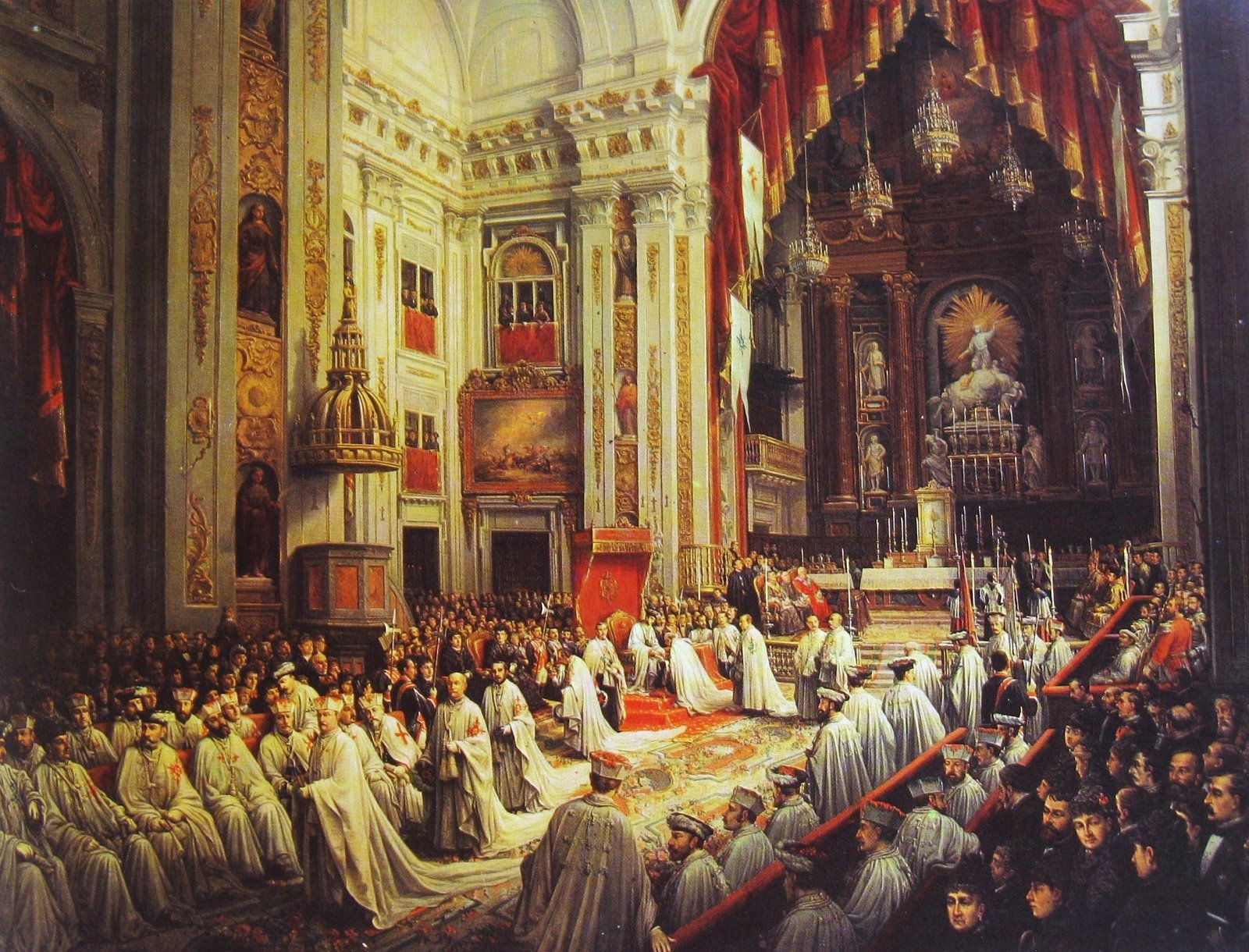 El lienzo representa la investidura del rey Alfonso XII de España (1857-1885), como gran maestre de las Órdenes militares españolas, el día 24 de febrero de 1877.